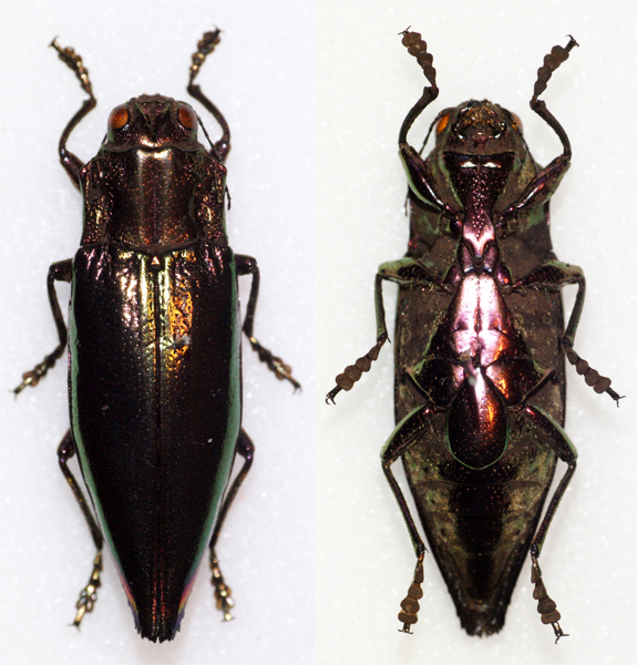 Buprestidae - In collection